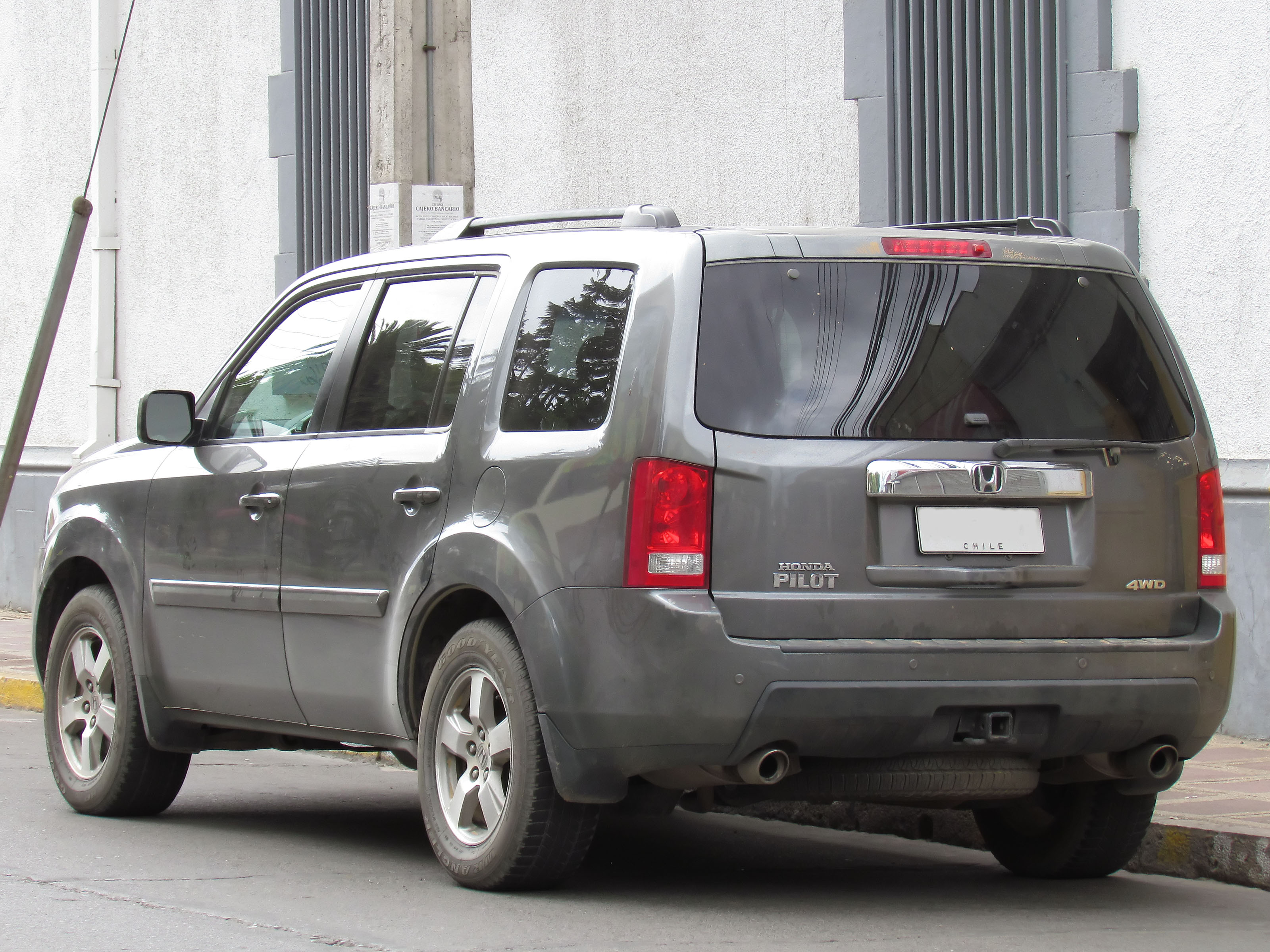 Honda Pilot EXL 2009